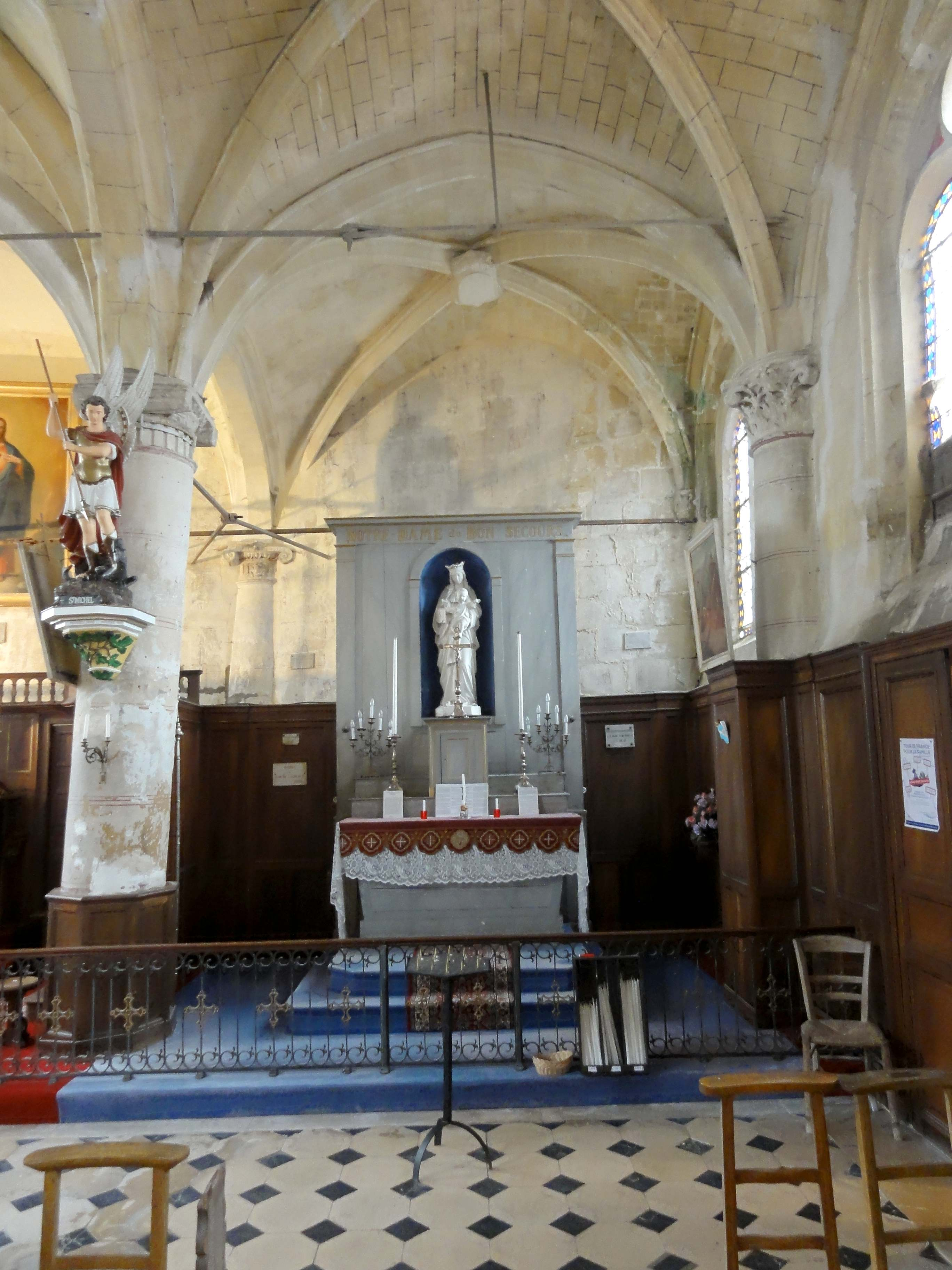 Intérieur de l'église (voir titre).